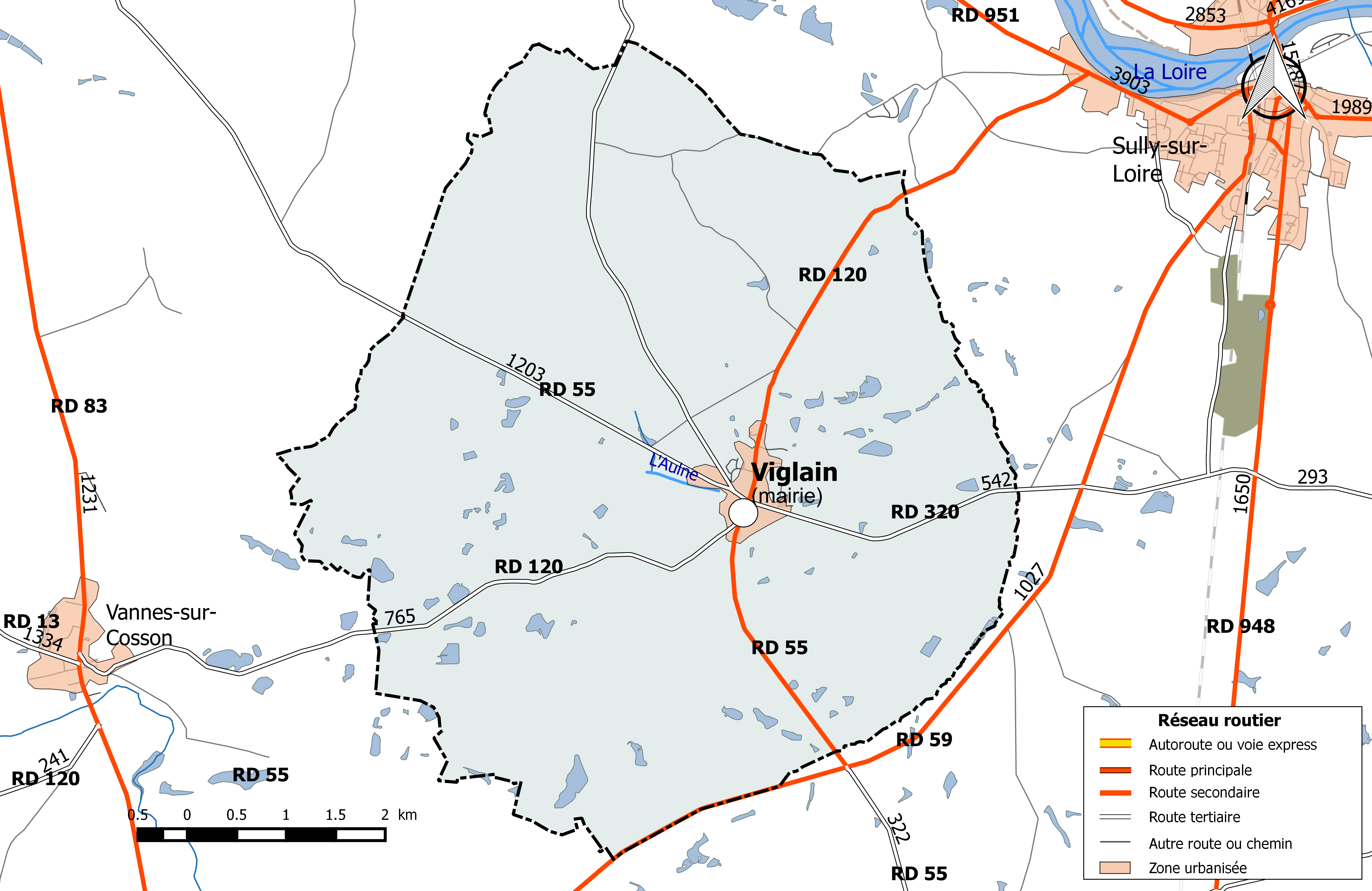 Carte du réseau routier de la commune de Viglain.